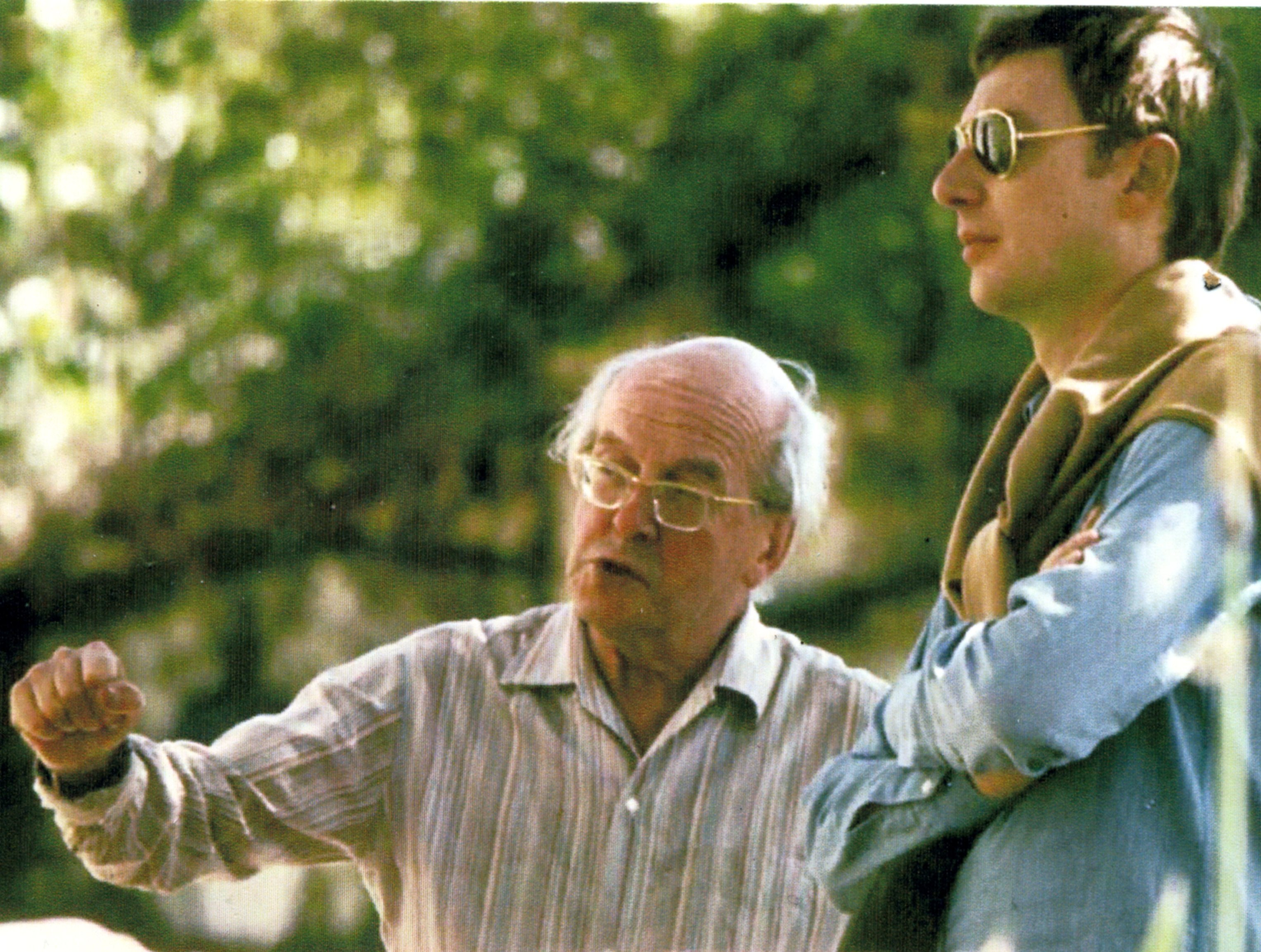 Le peintre français Jean Le Moal vers 1981